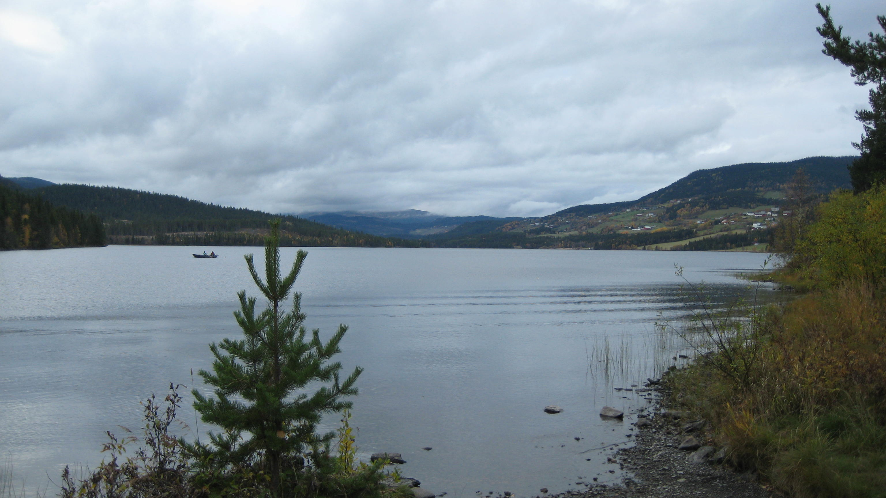 Heggefjorden ved Heggenes